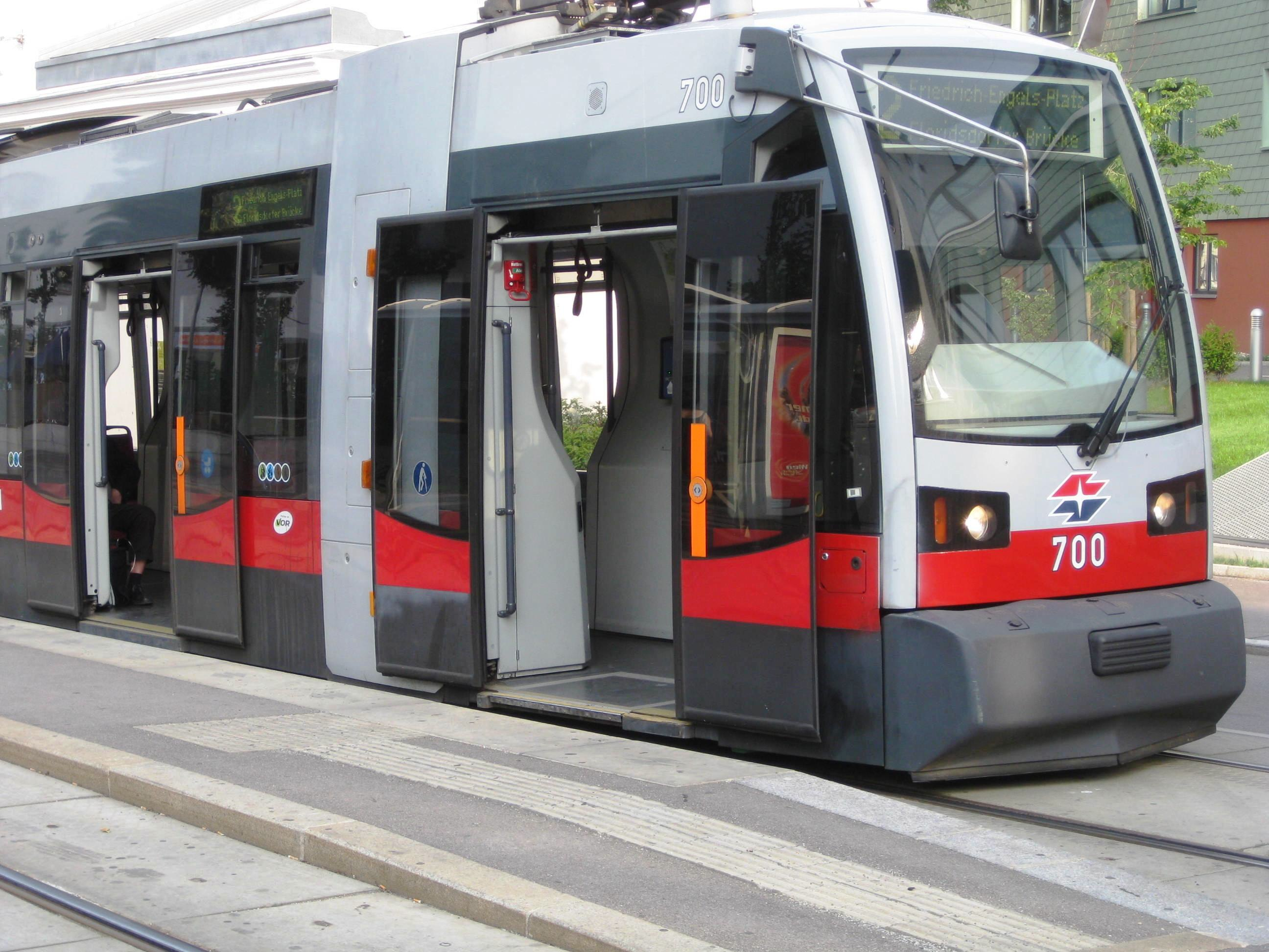 Vienna Trams 26june2010-1